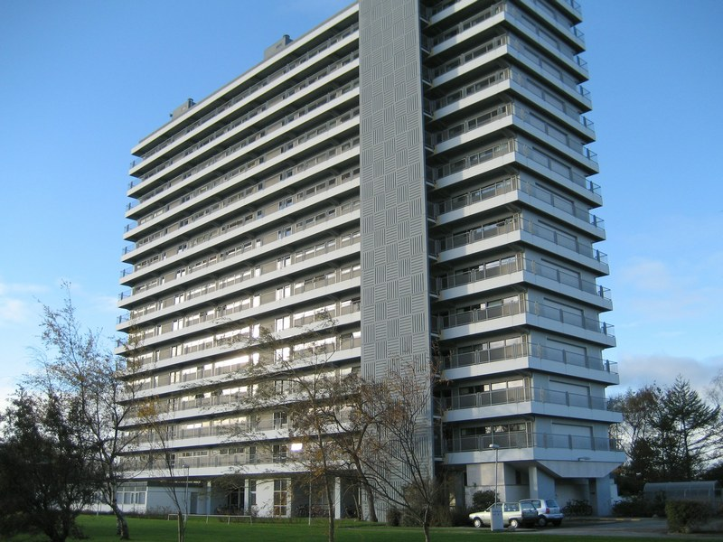 Langenæshus november 2006